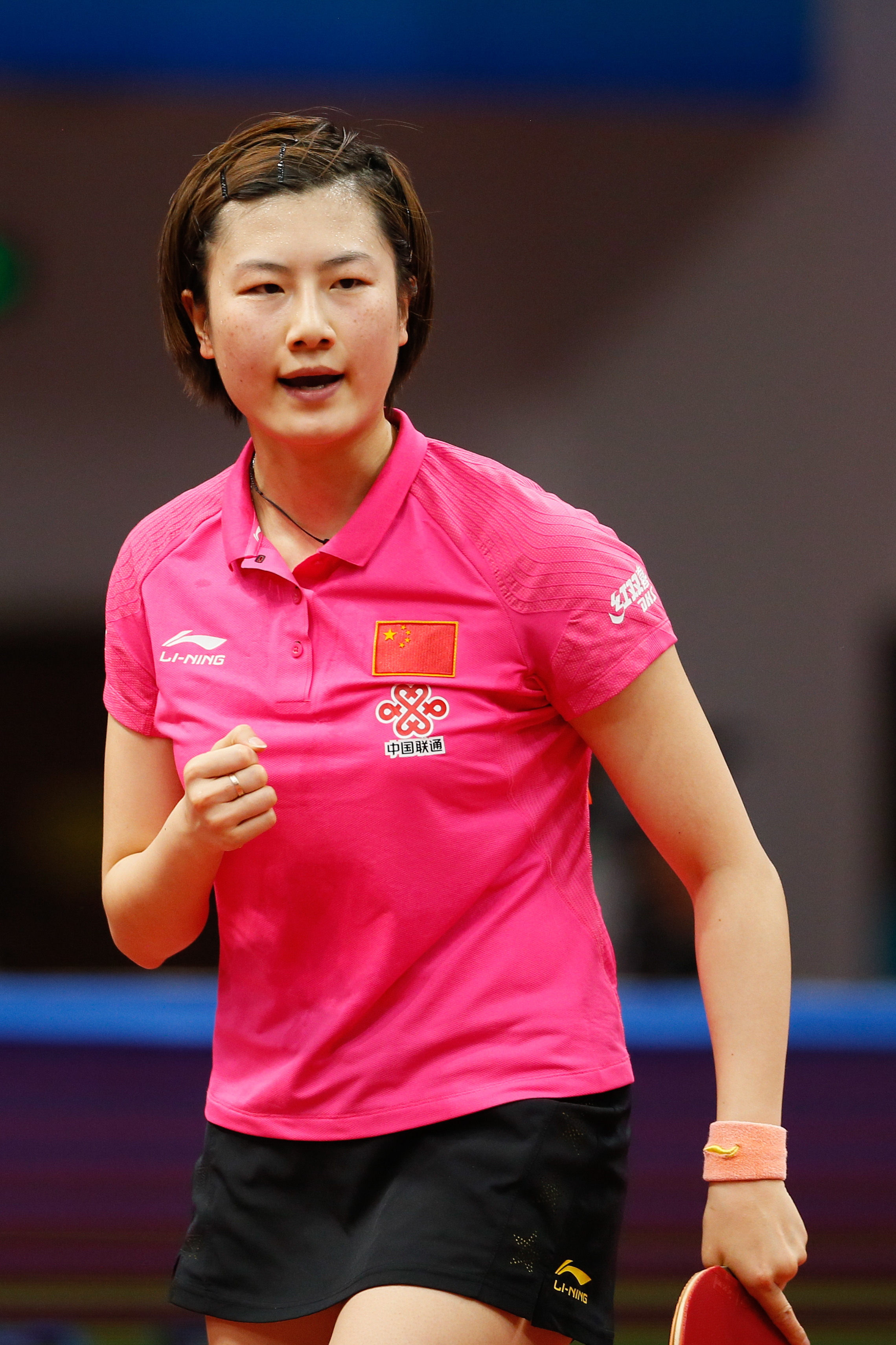 _K0K0887